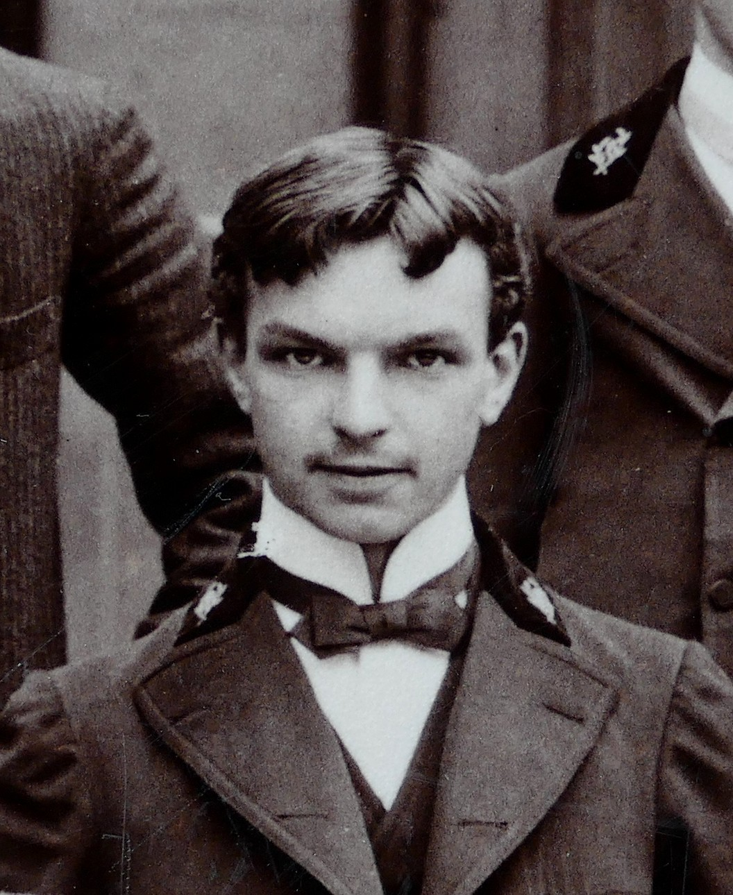 Pierre Renoir lors de sa scolarité à l'Institution Sainte-Croix de Neuilly (vers 1903). Détail d'une photo de classe, photographe De Jongh frères, Neuilly.